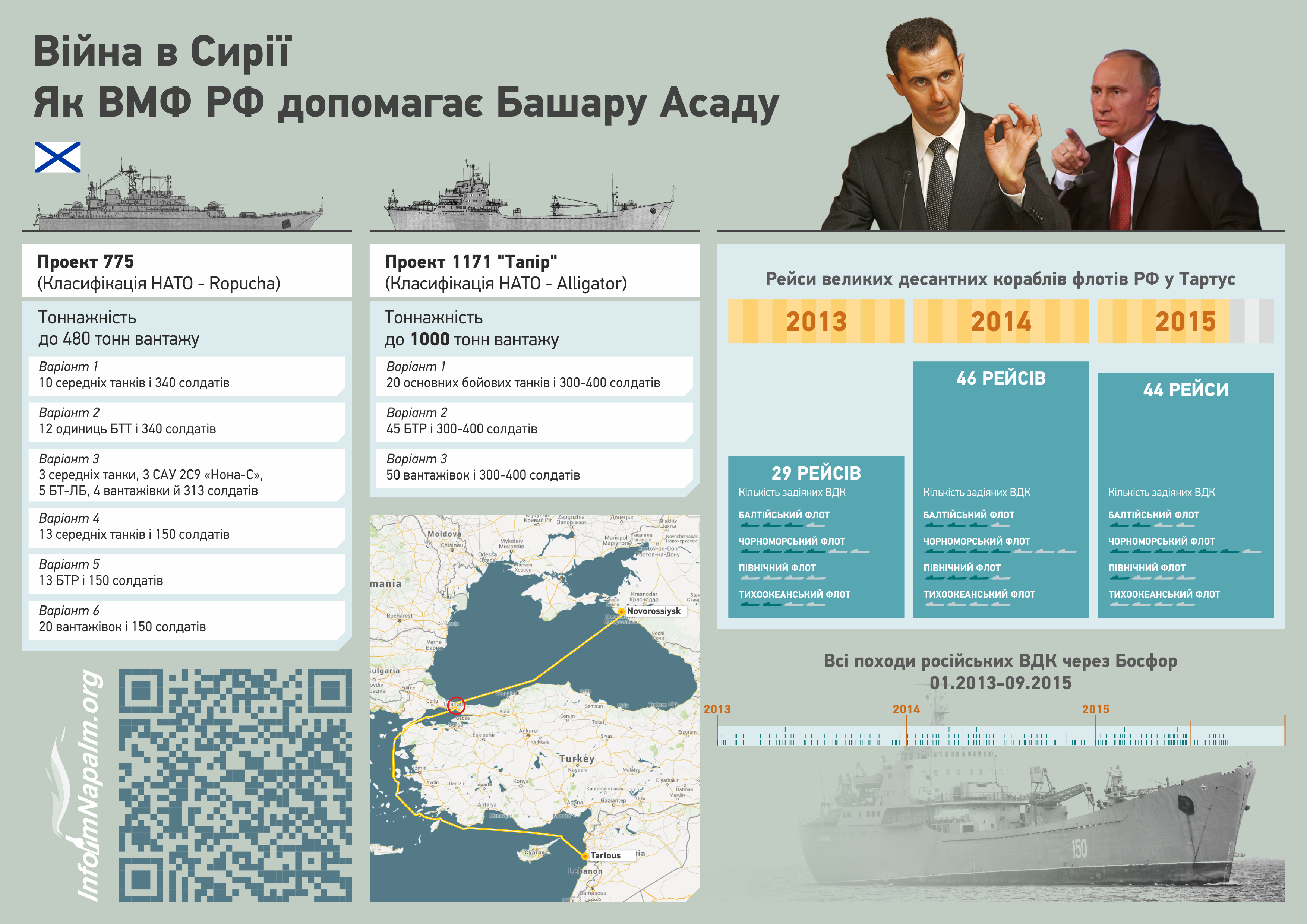 Інфографіка від Inform Napalm. Війна в Сирії. Як ВМФ РФ допомагає Башару Асаду.